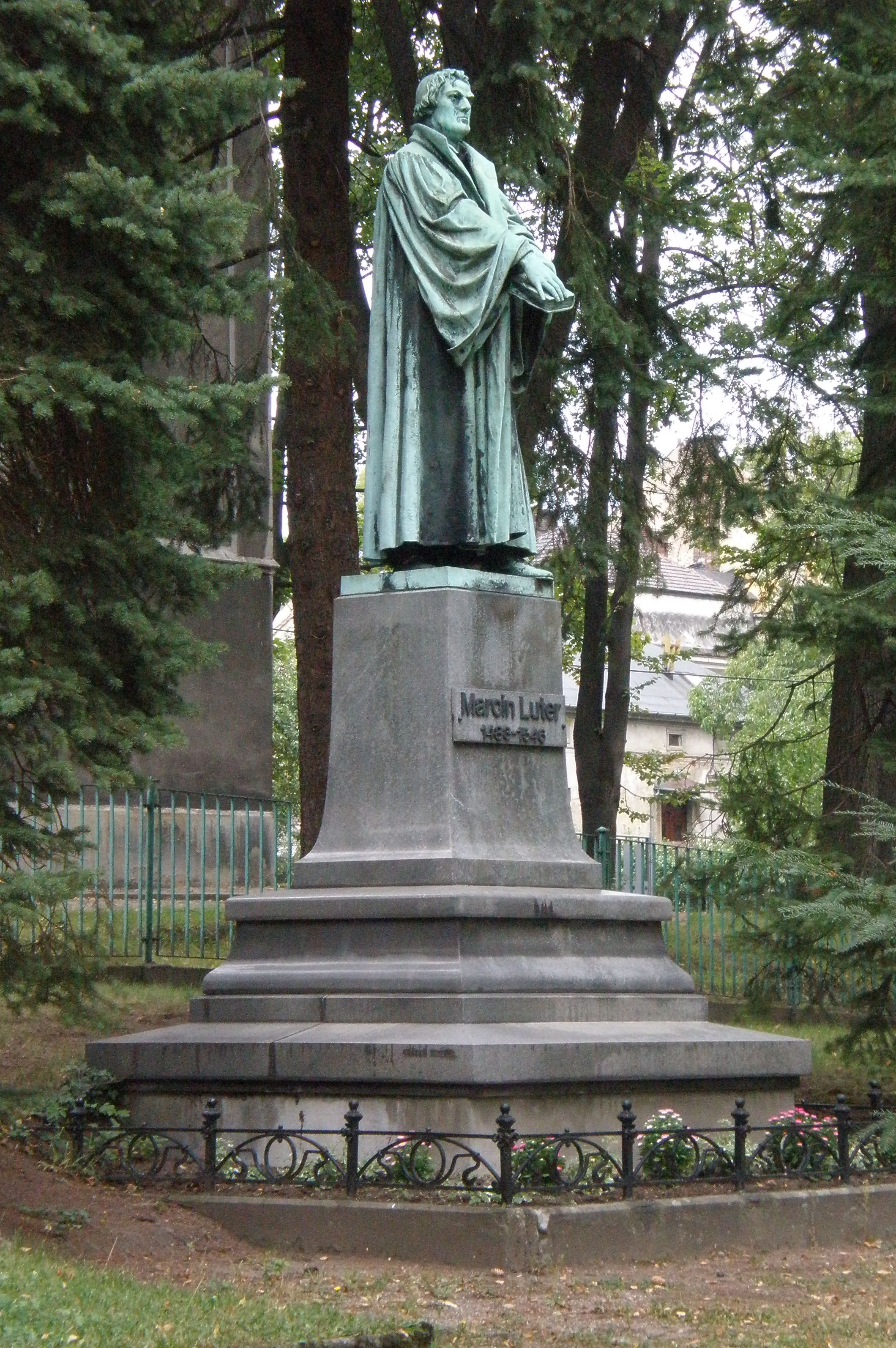 Pomnik Marcina Lutra w Bielsku-Białej